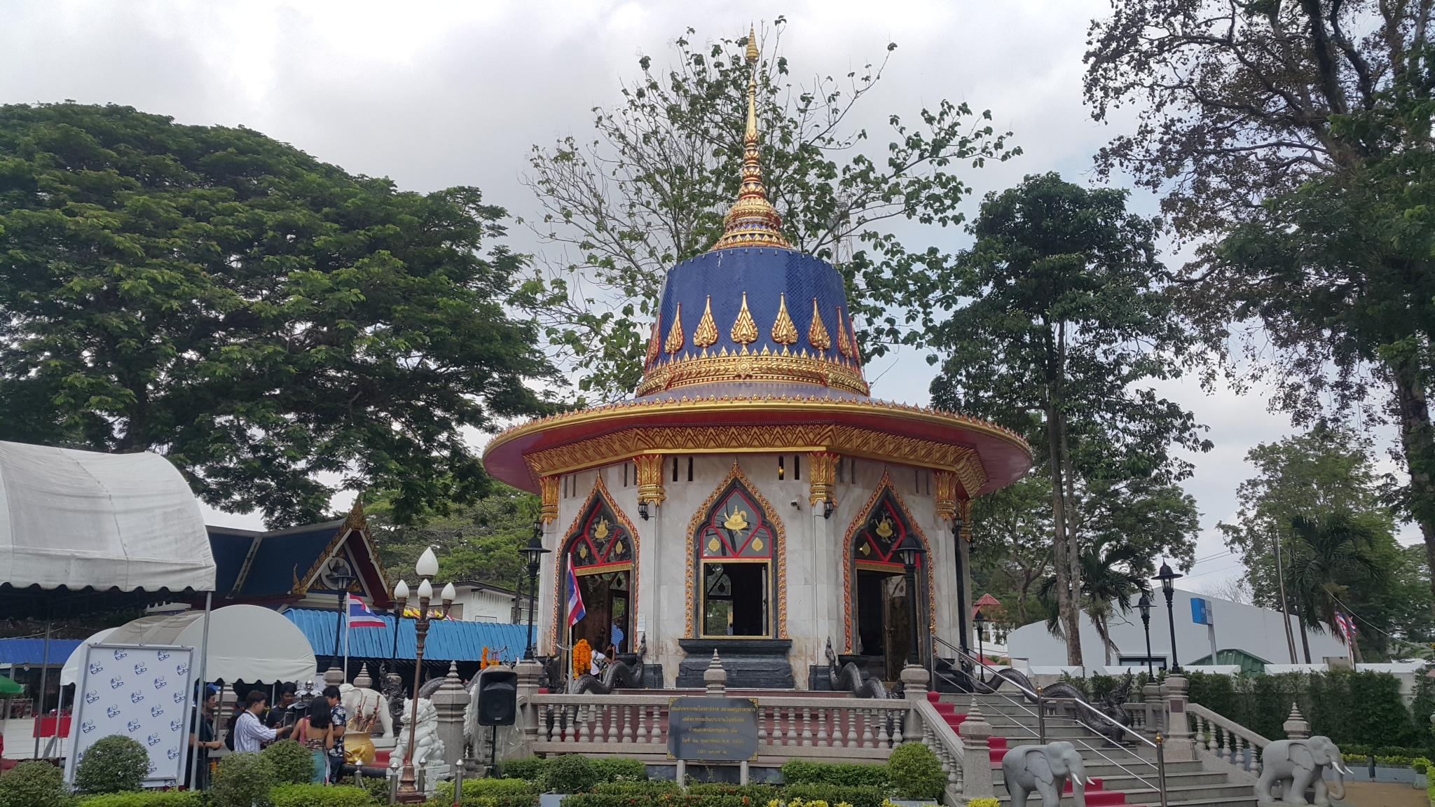 ศาลสมเด็จพระเจ้าตากสินมหาราชอันศักดิ์สิทธิ์ประจำจังหวัดจันทบุรี